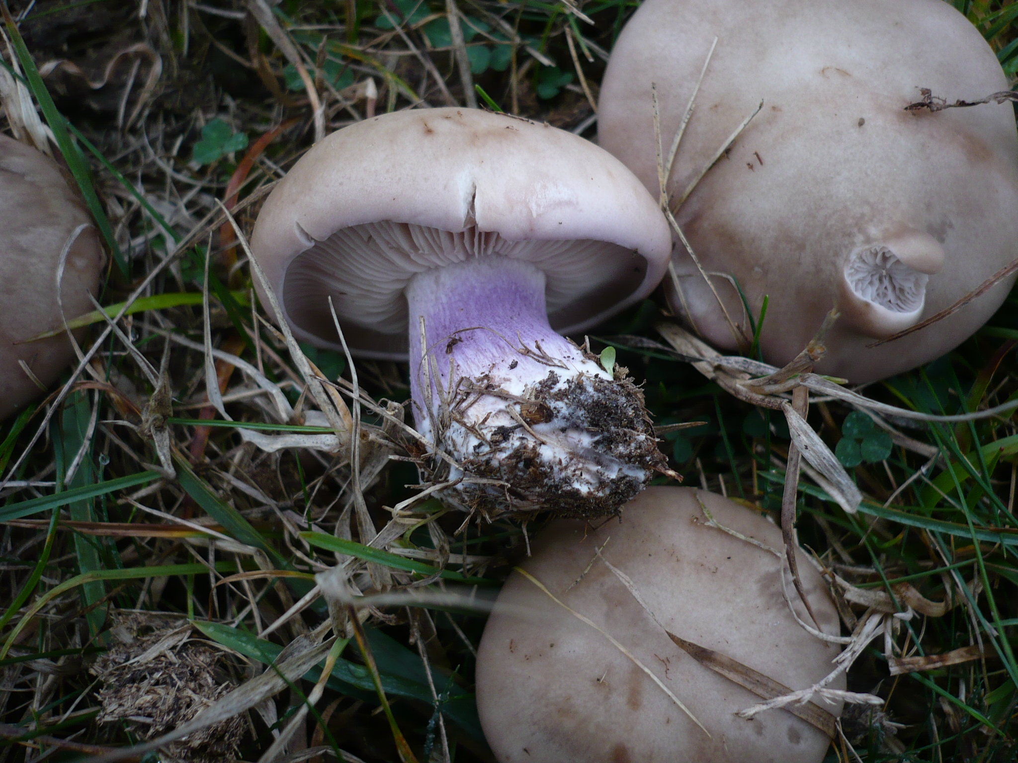 Lepista saeva (Fr.) P.D. Orton